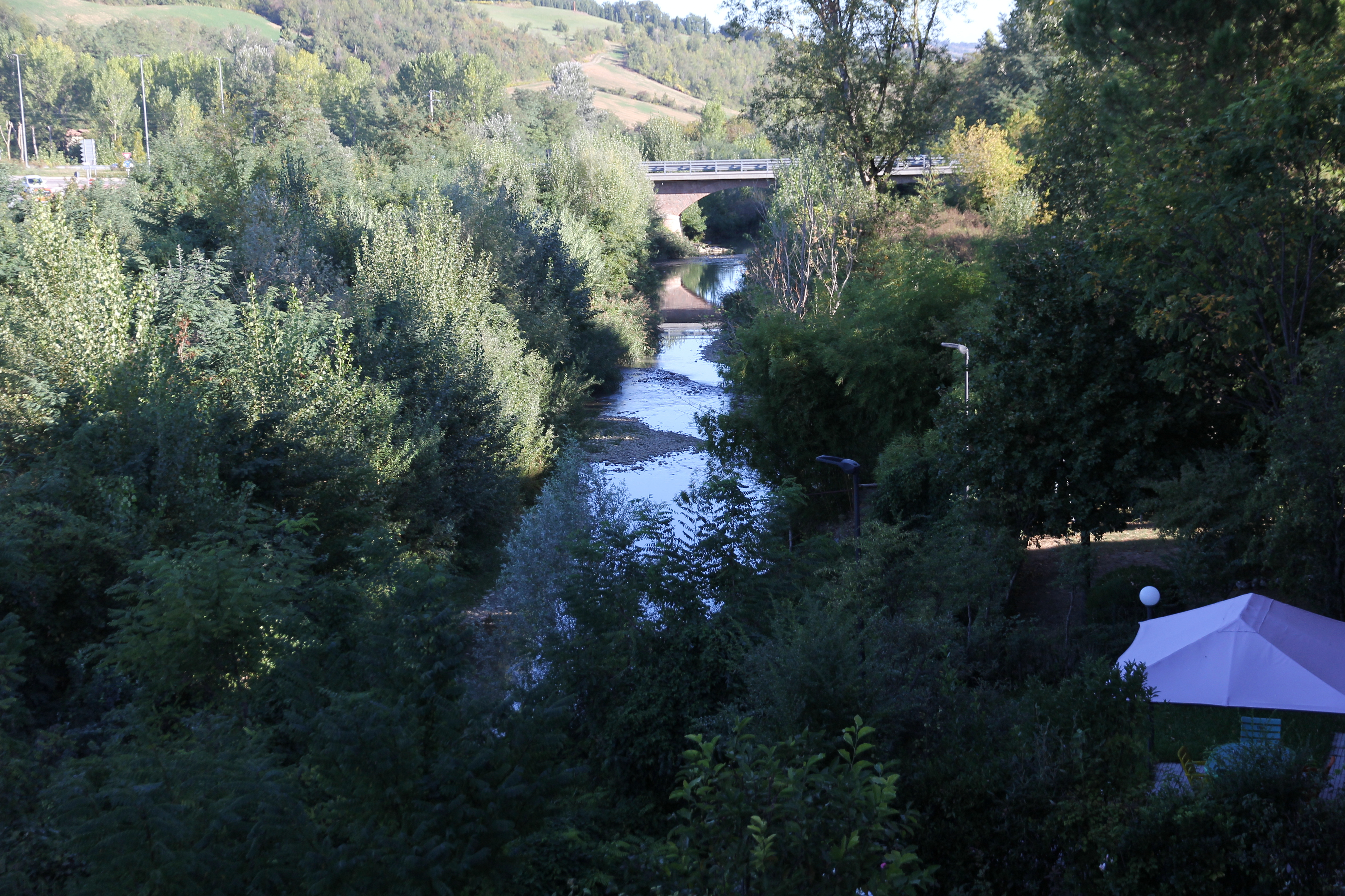 Pianoro, torrente Savena